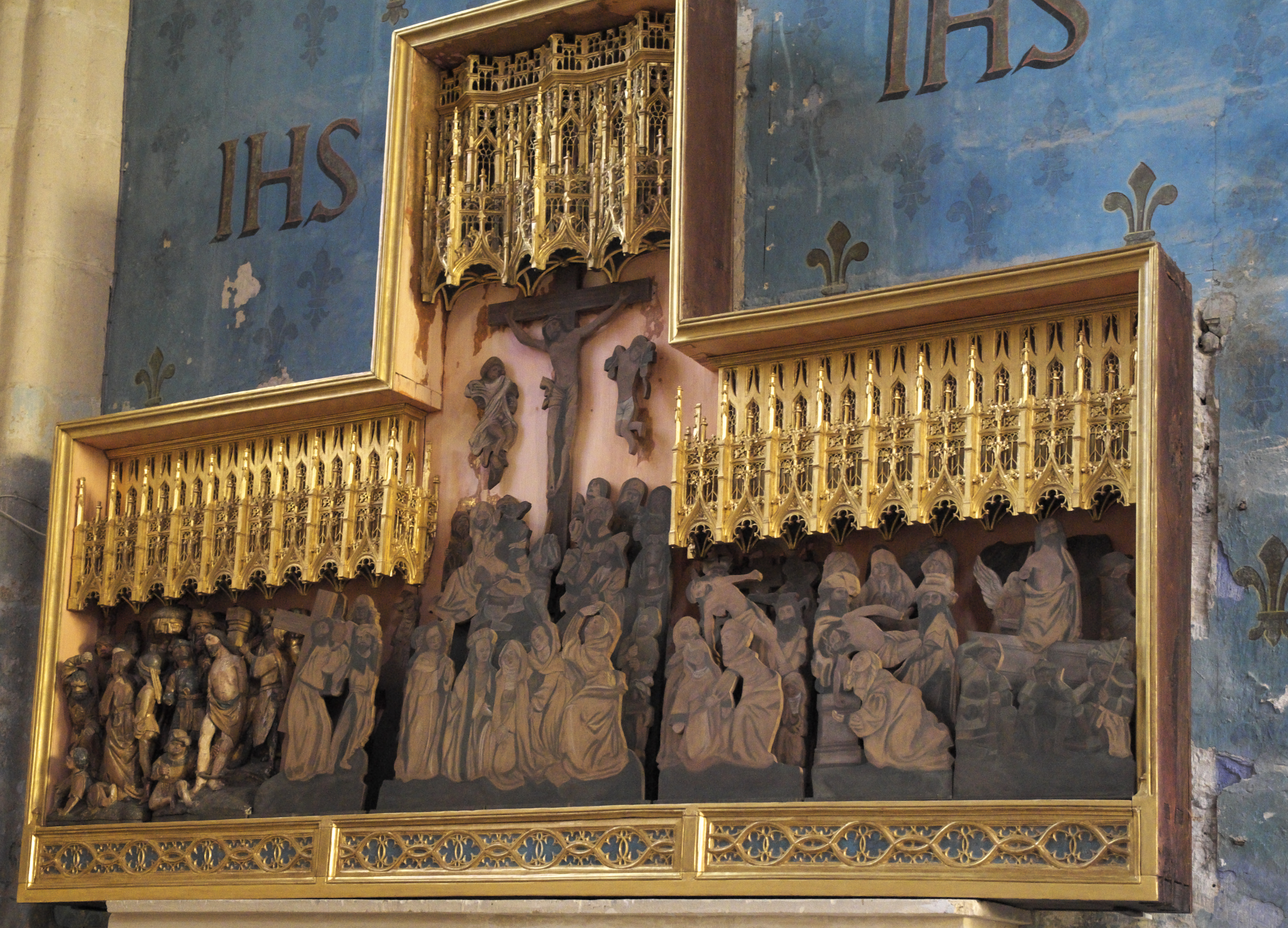 Katholische Pfarrkirche Notre-Dame in Vétheuil im Département Val-d’Oise in der Region Île-de-France (Frankreich), Passionsaltar mit Fragmenten aus dem frühen 16. Jahrhundert